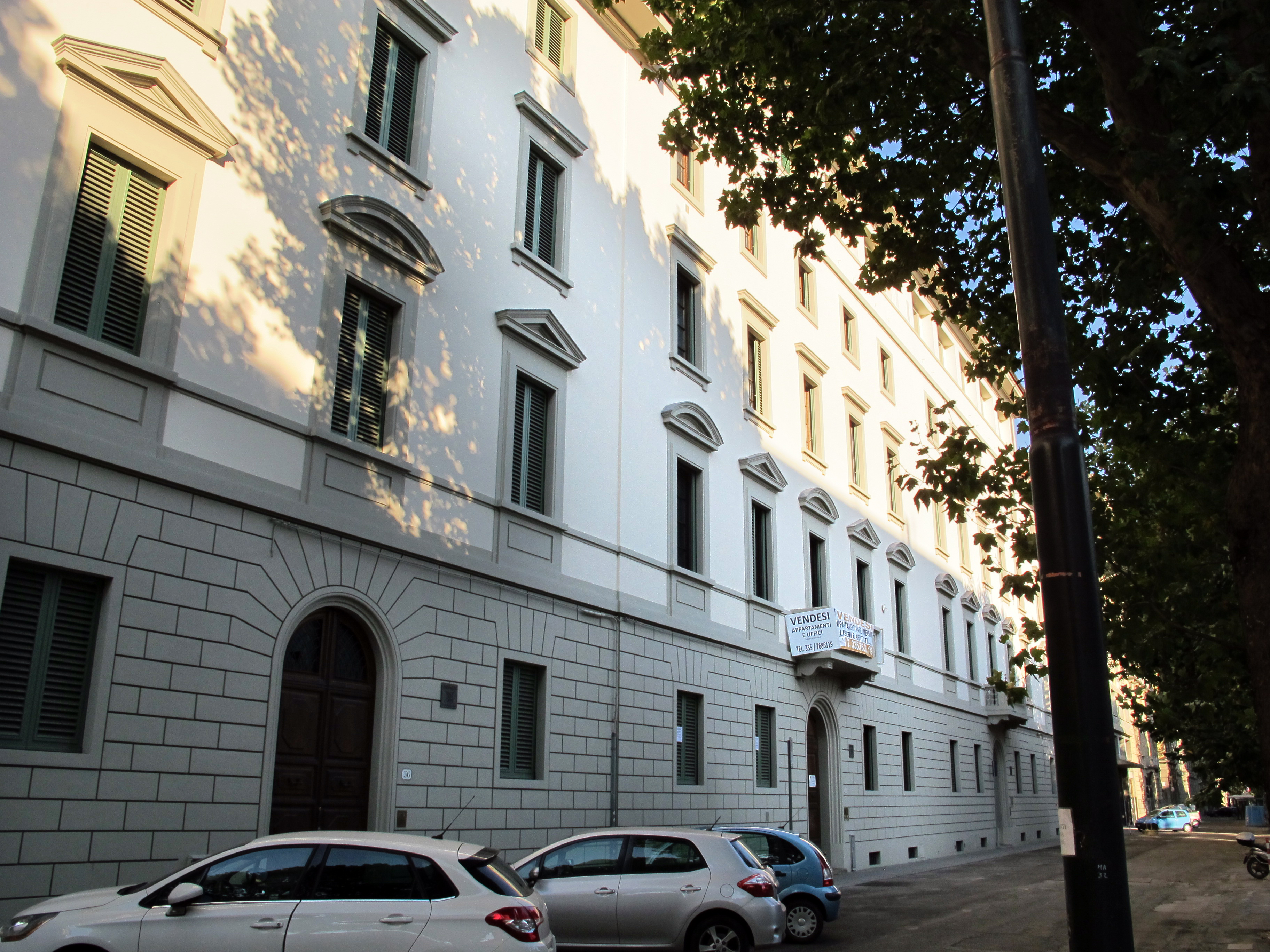 Viale Giacomo Matteotti e piazza Isidoro del Lungo, Firenze